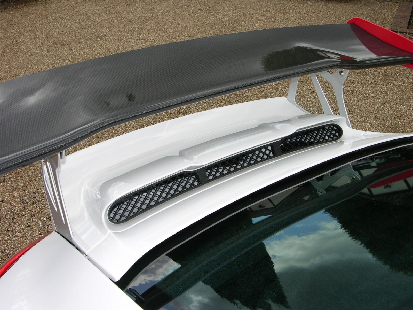 2010 Porsche 911 GT3 RS